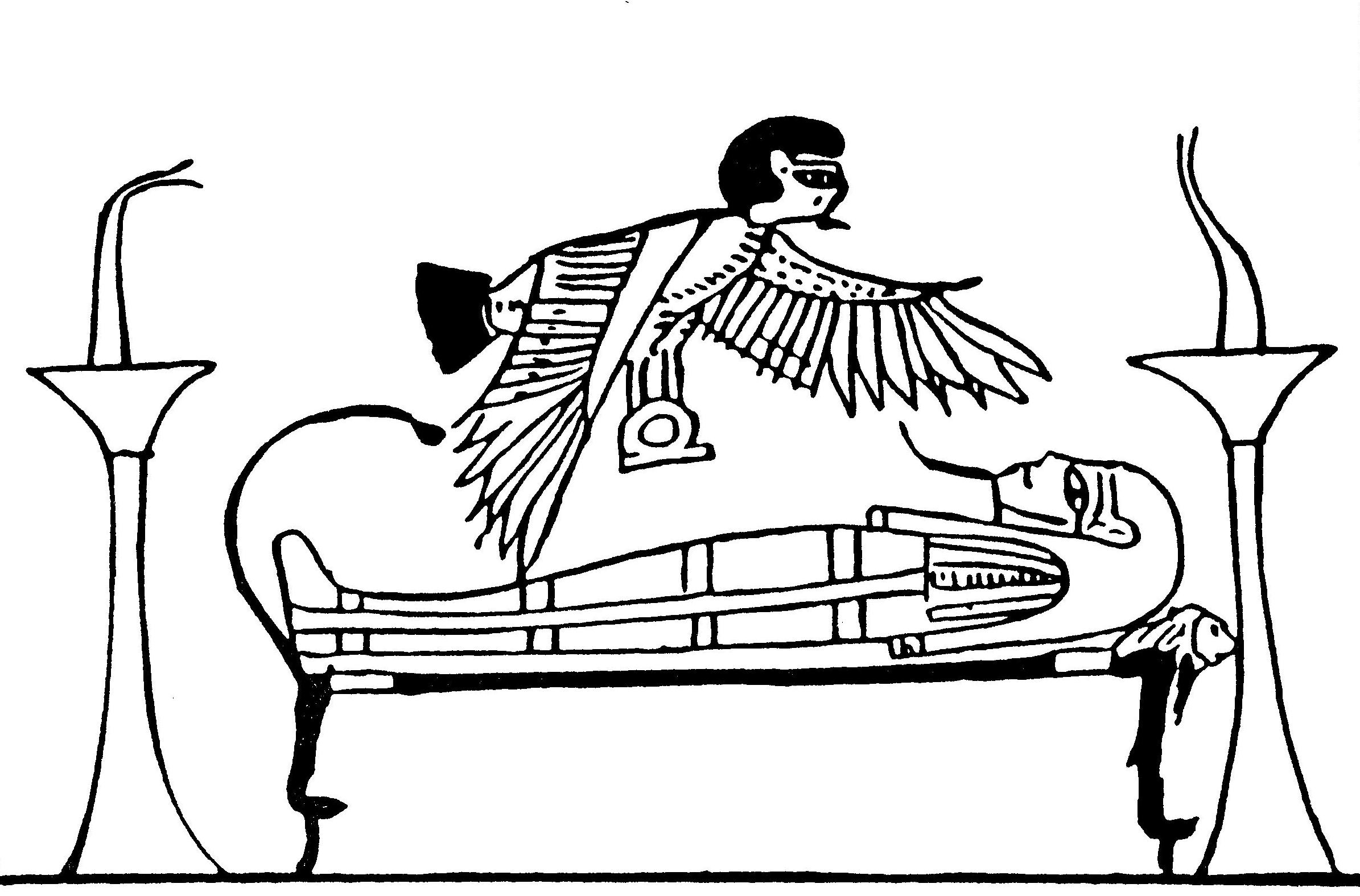 Ba_and_mum.jpg